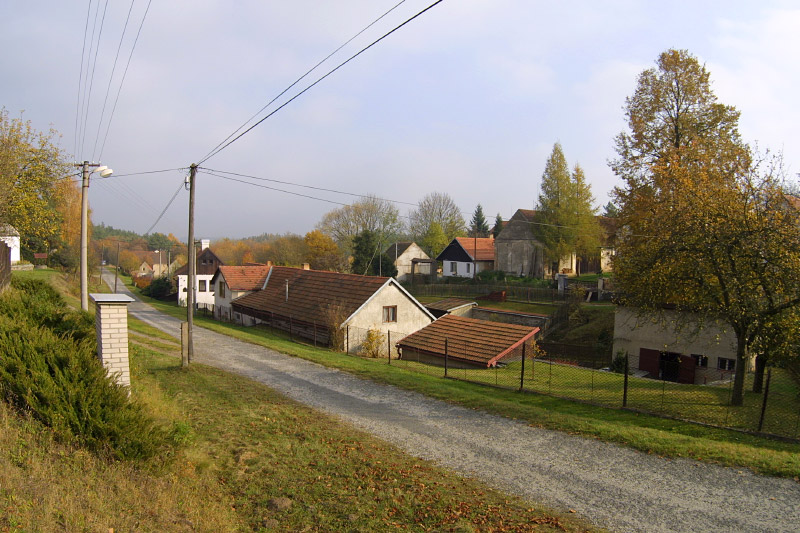 Pohled k východnímu okraji Lhoty u Chříče.